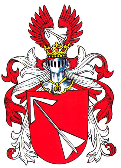 Křemže, znak.